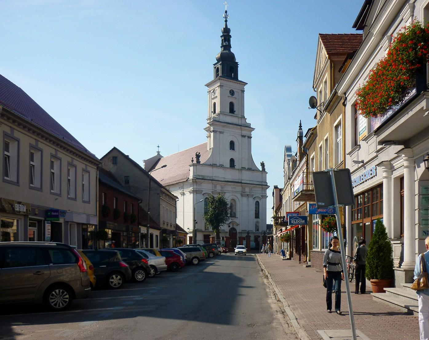 Ulica Kościelna, widok od strony rynku w kierunku kościoła NMP.